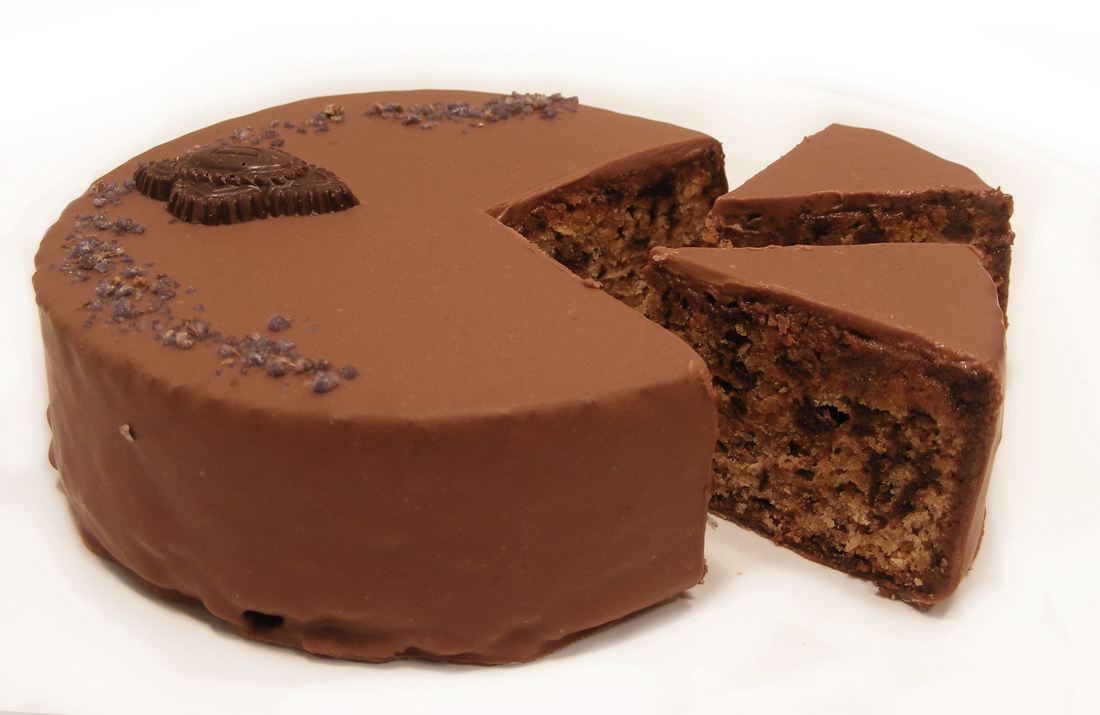 Sachertorte from Demel bakery